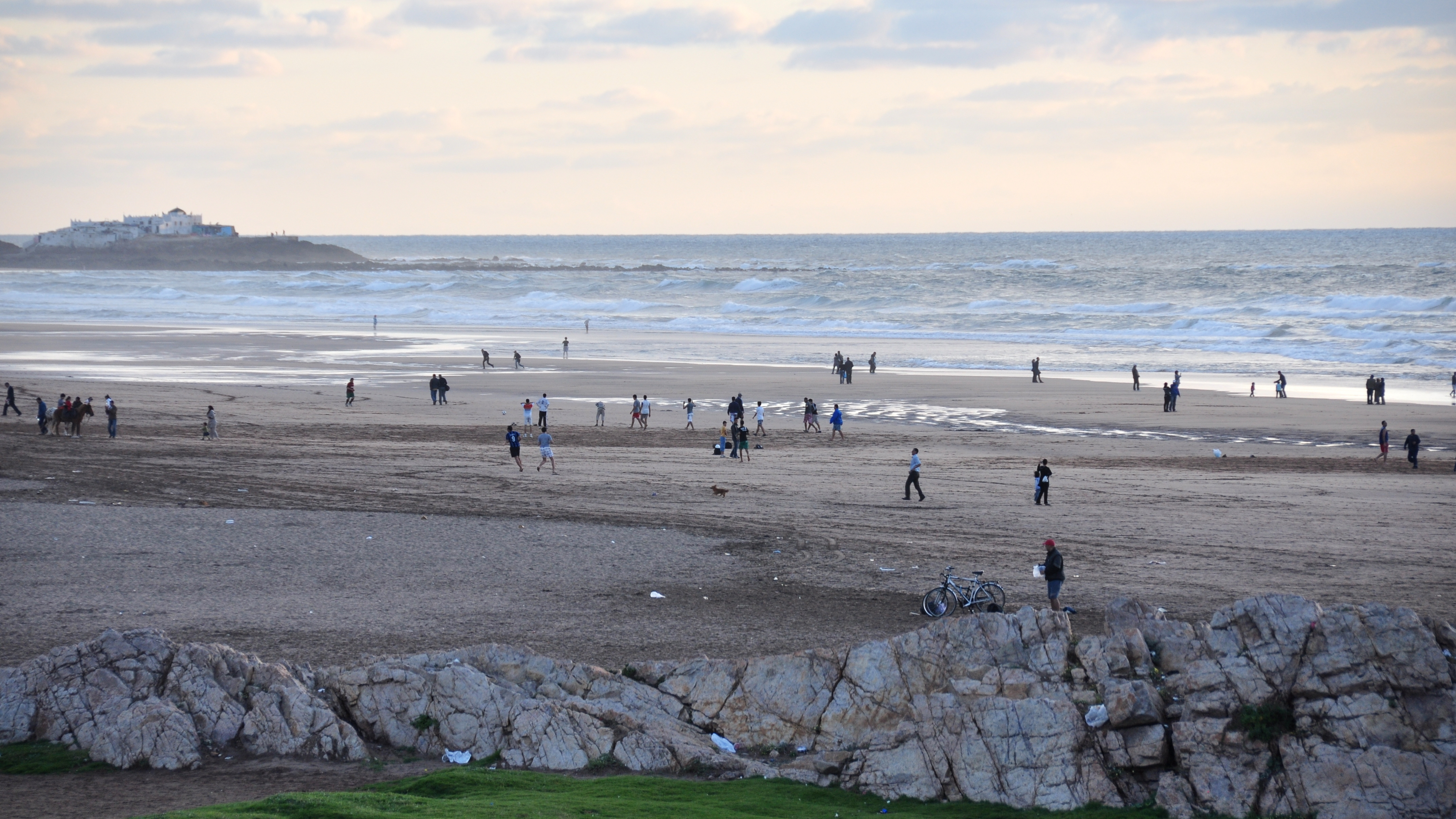 Casablanca